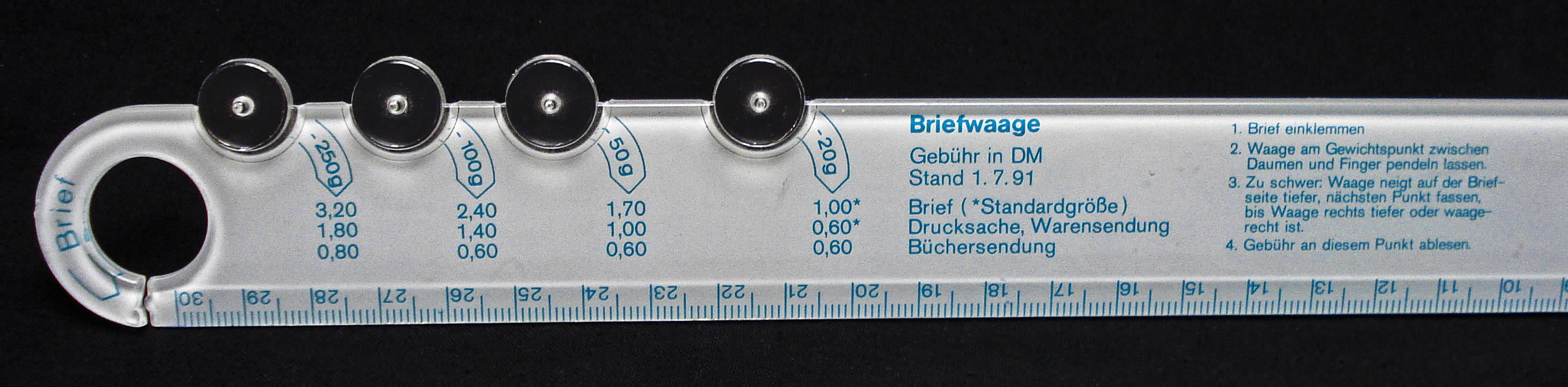 Lineal, das auch als Briefwaage einsetzbar ist.